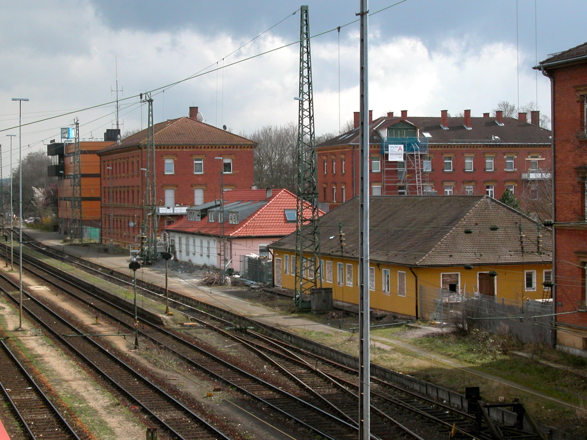 Nuernberg_Rangierbahnhof_Ausfahrt_Pb